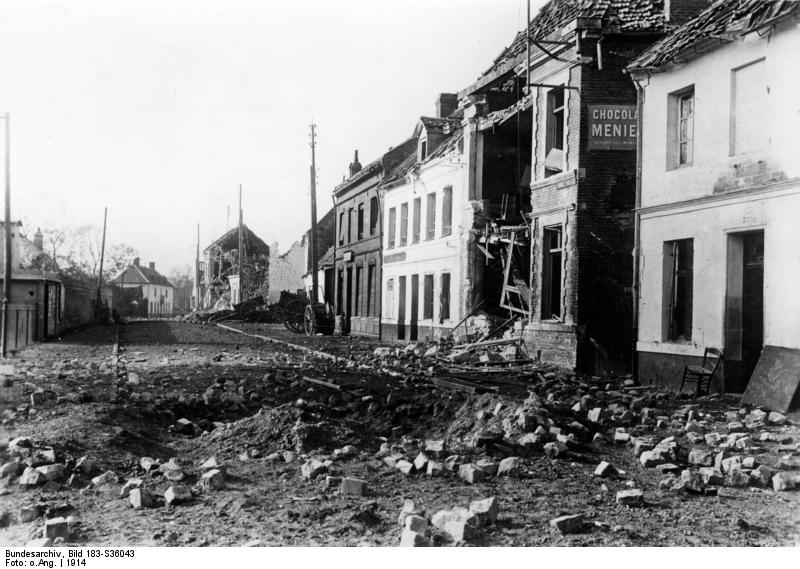 Frankreich, St. Laurent, Zerstörungen Weltkrieg 1914. Von den Kämpfen um den Vorort Saint-Laurent-Blangy bei Arras. Einschlag eines Minenwerfergeschosses auf der Strasse. 25247/14